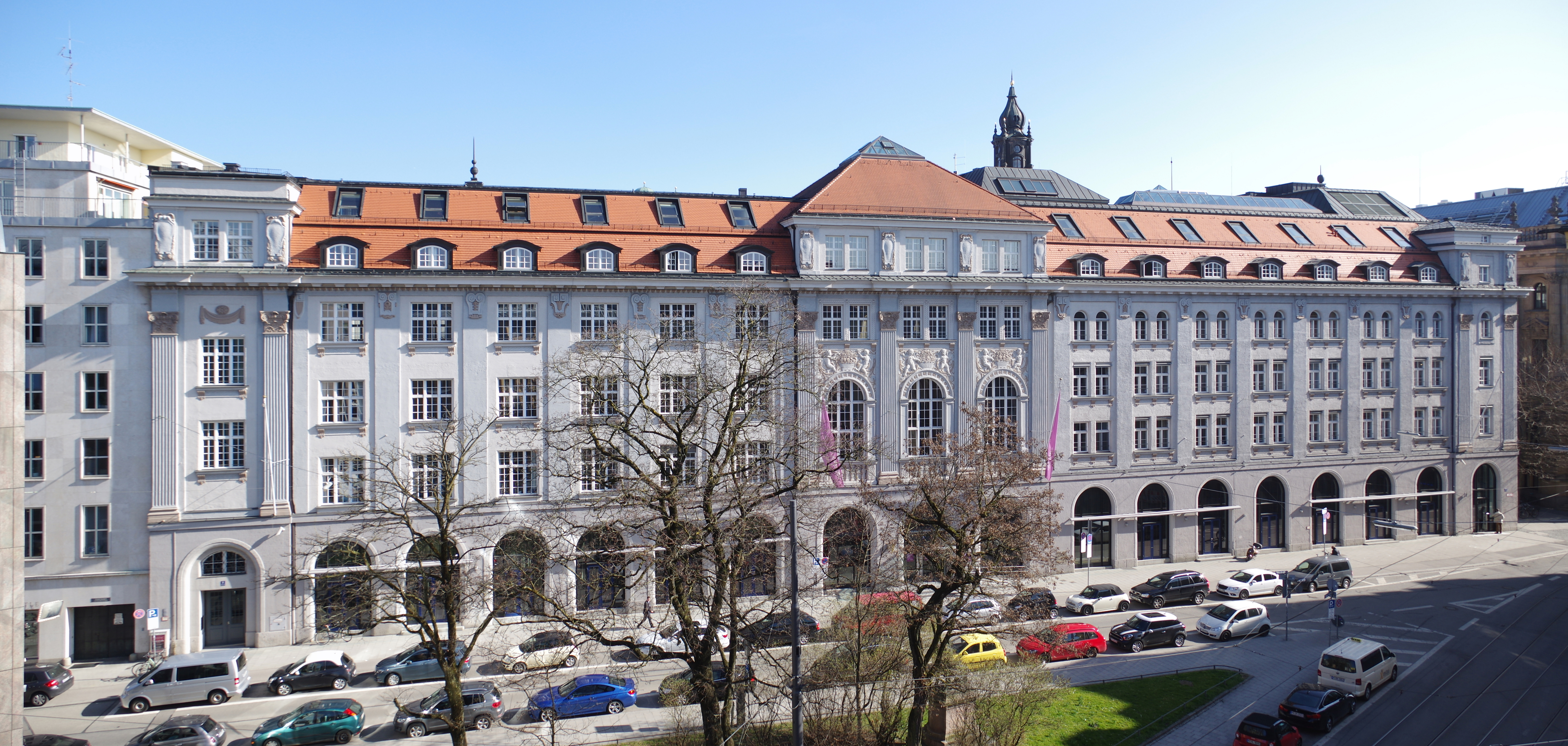 München, Ottostraße 4/6/8, Erweiterungsbau des Bernheimer-Hauses; Akten-Nr. D-1-62-000-3820